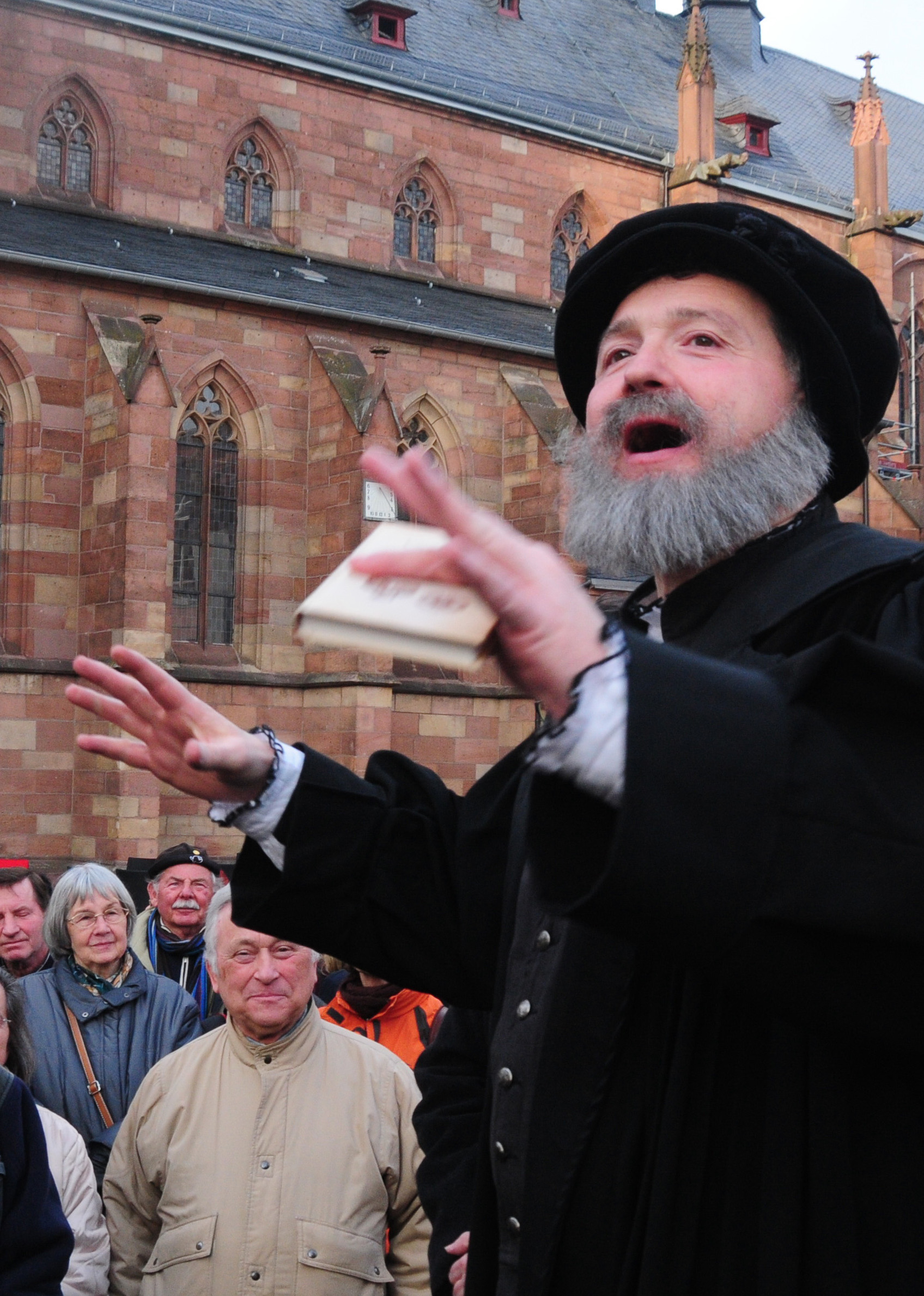 Autor und Theologe Michael Landgraf bei einer Stadtführung als Zacharias Ursinus